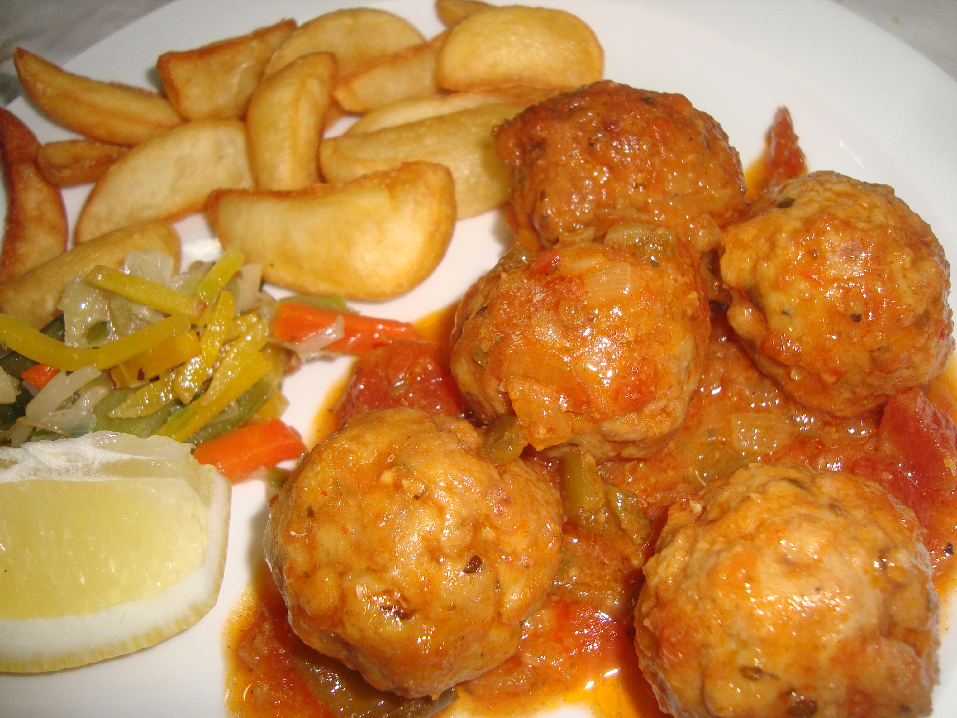 Plato de albóndigas